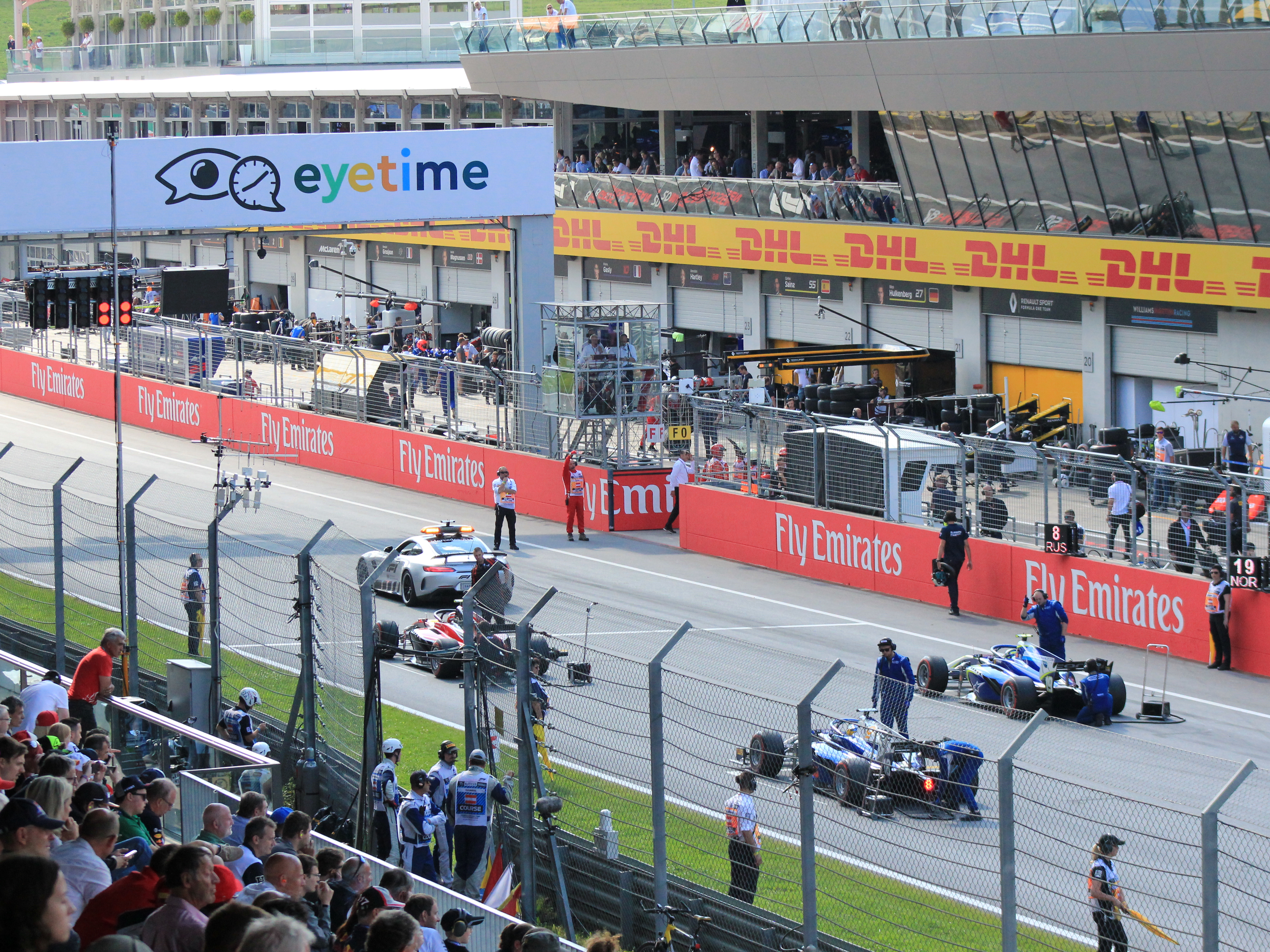 Das Startfeld kurz vor der Freigabe zur Einführungsrunde